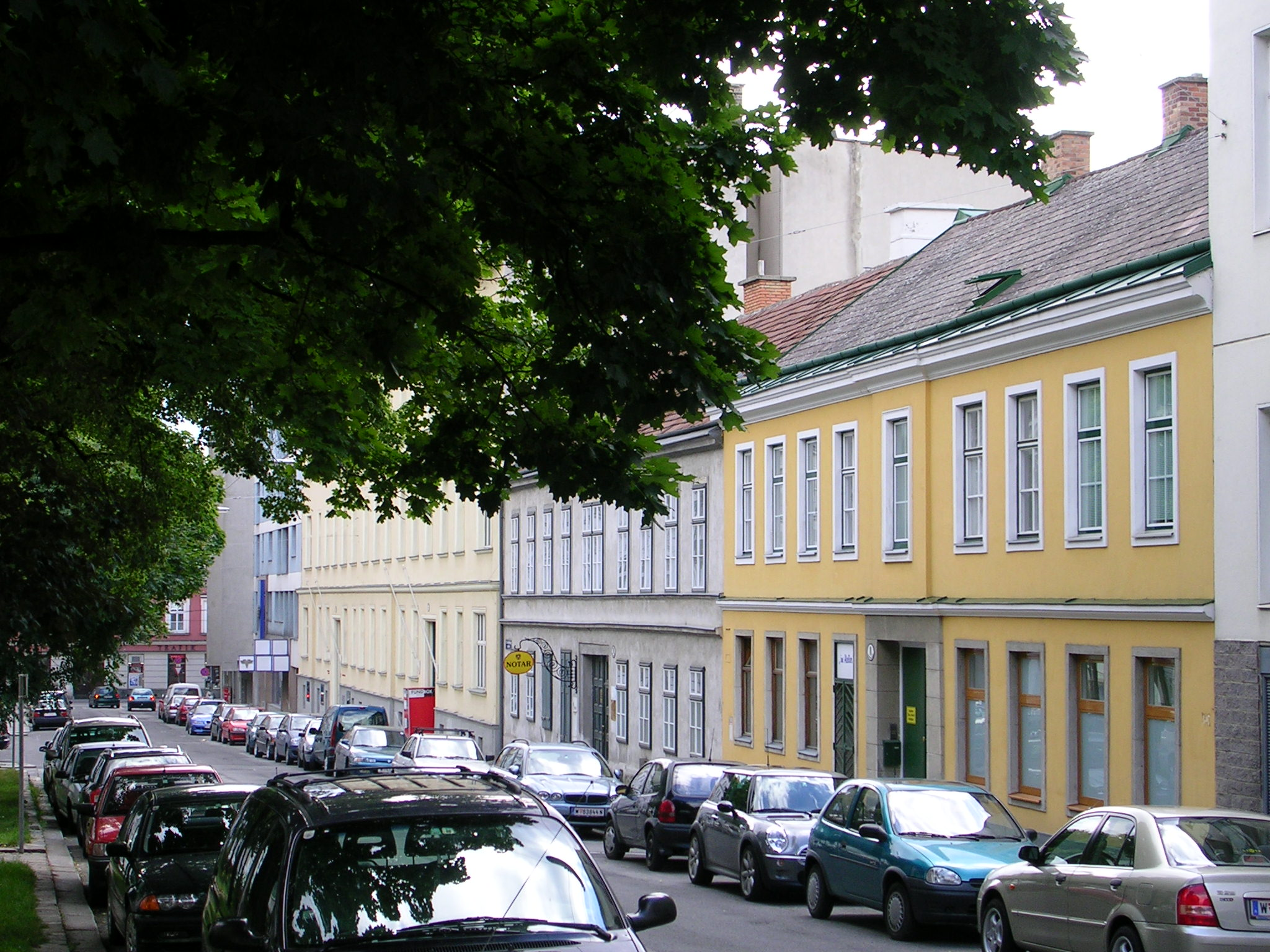 Gatterburgplatz in Döbling (Döbling)